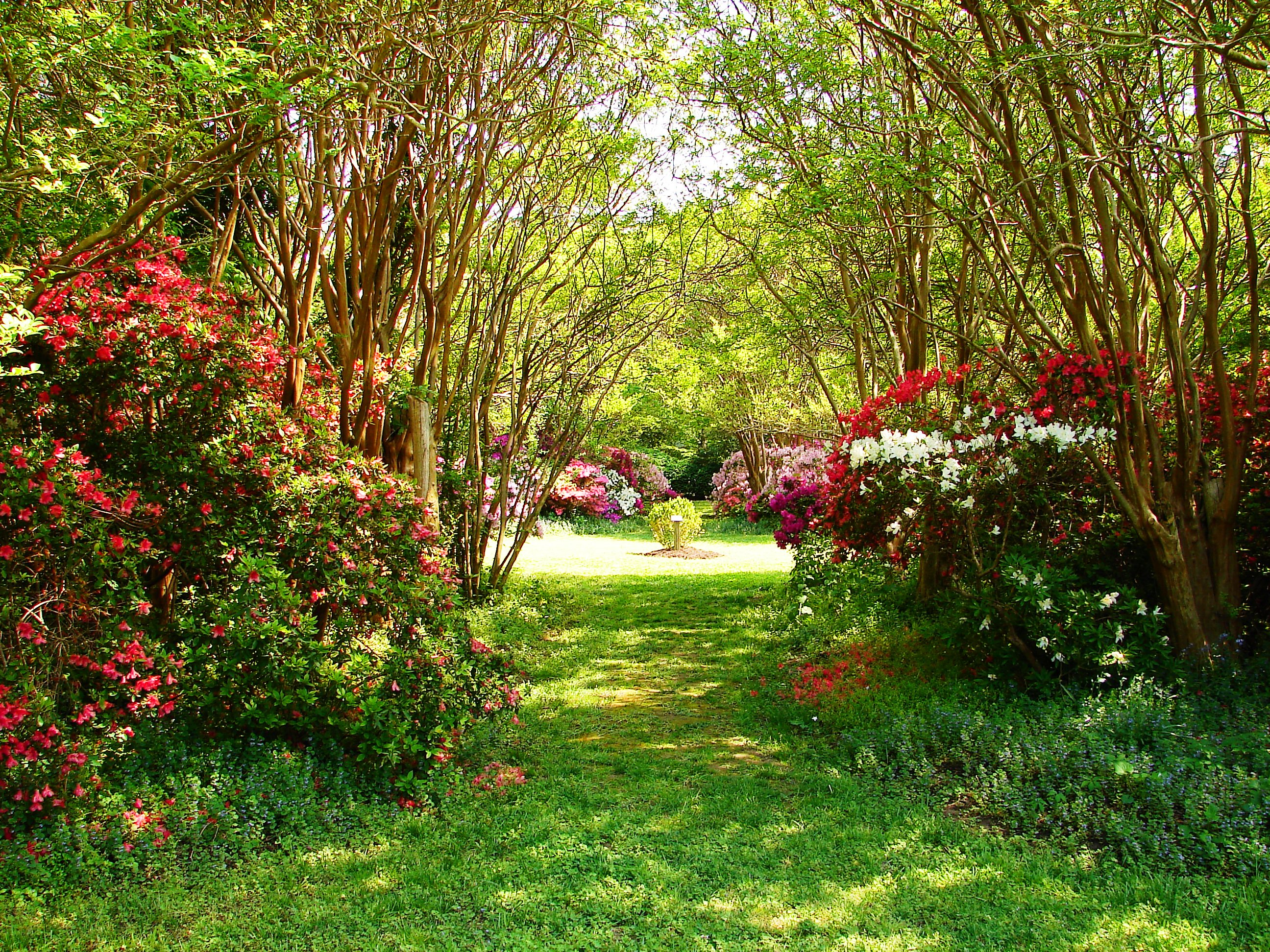 Gardens